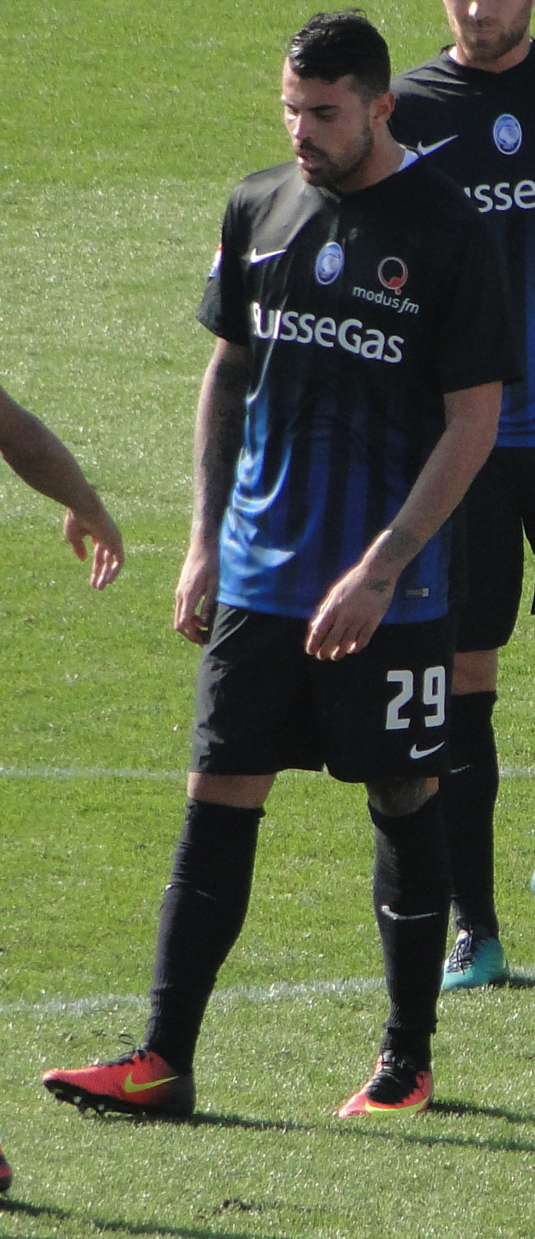 Andrea Petagna, calciatore italiano